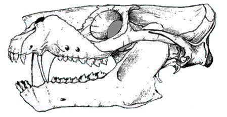 Trucidocynodon skull